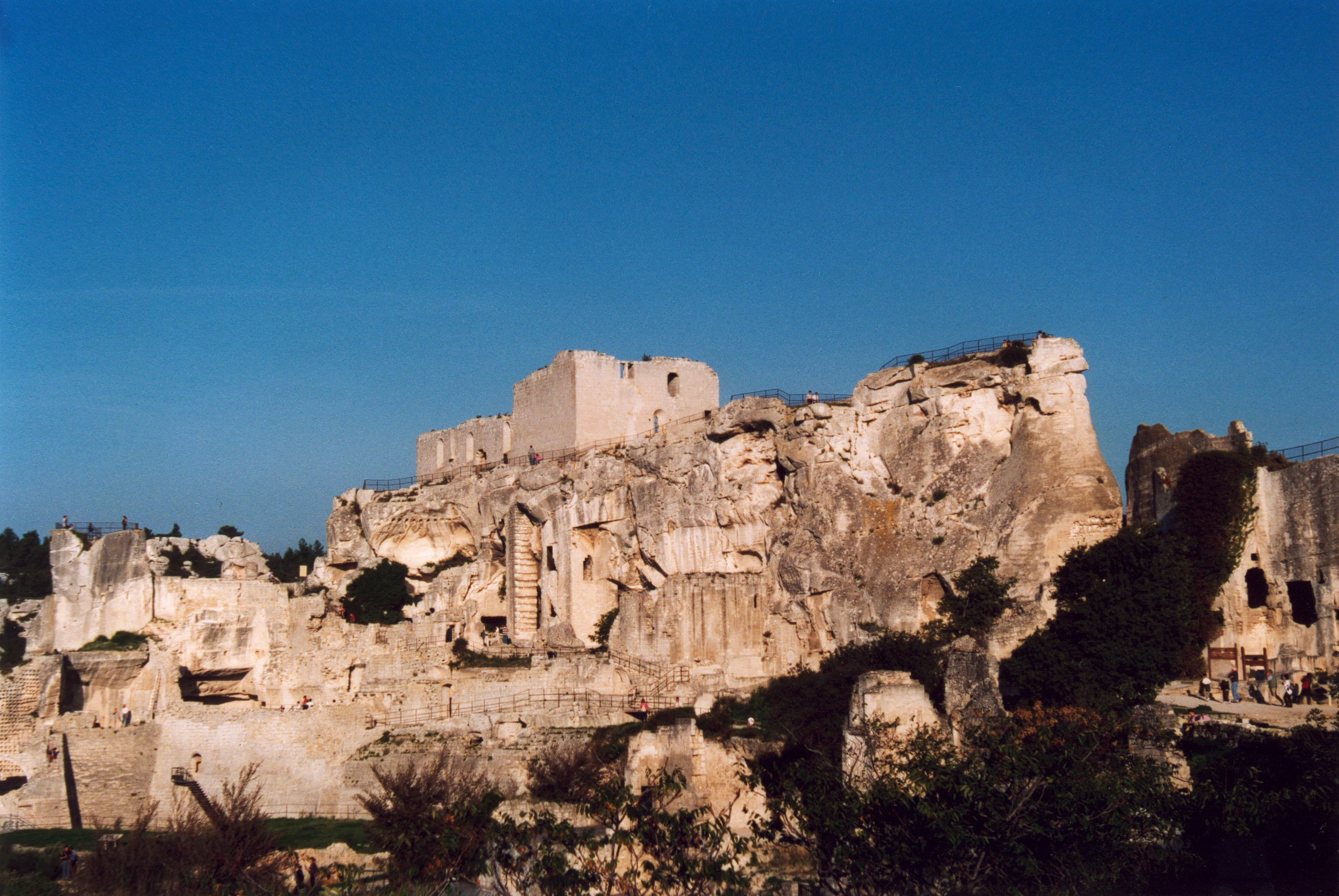 Les Baux-de-Provence Bouche du Rhône France Chateau Photographie prise par Patrick GIRAUD